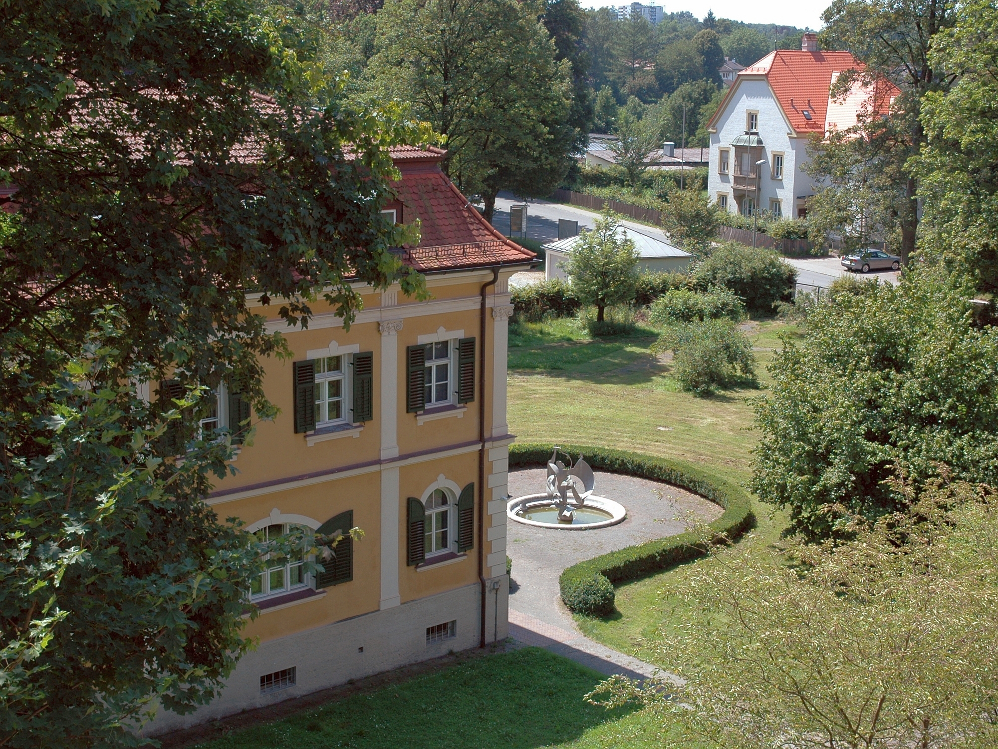 Luitpold-Gymnasium Wasserburg am Inn - Bayern - Deutschland